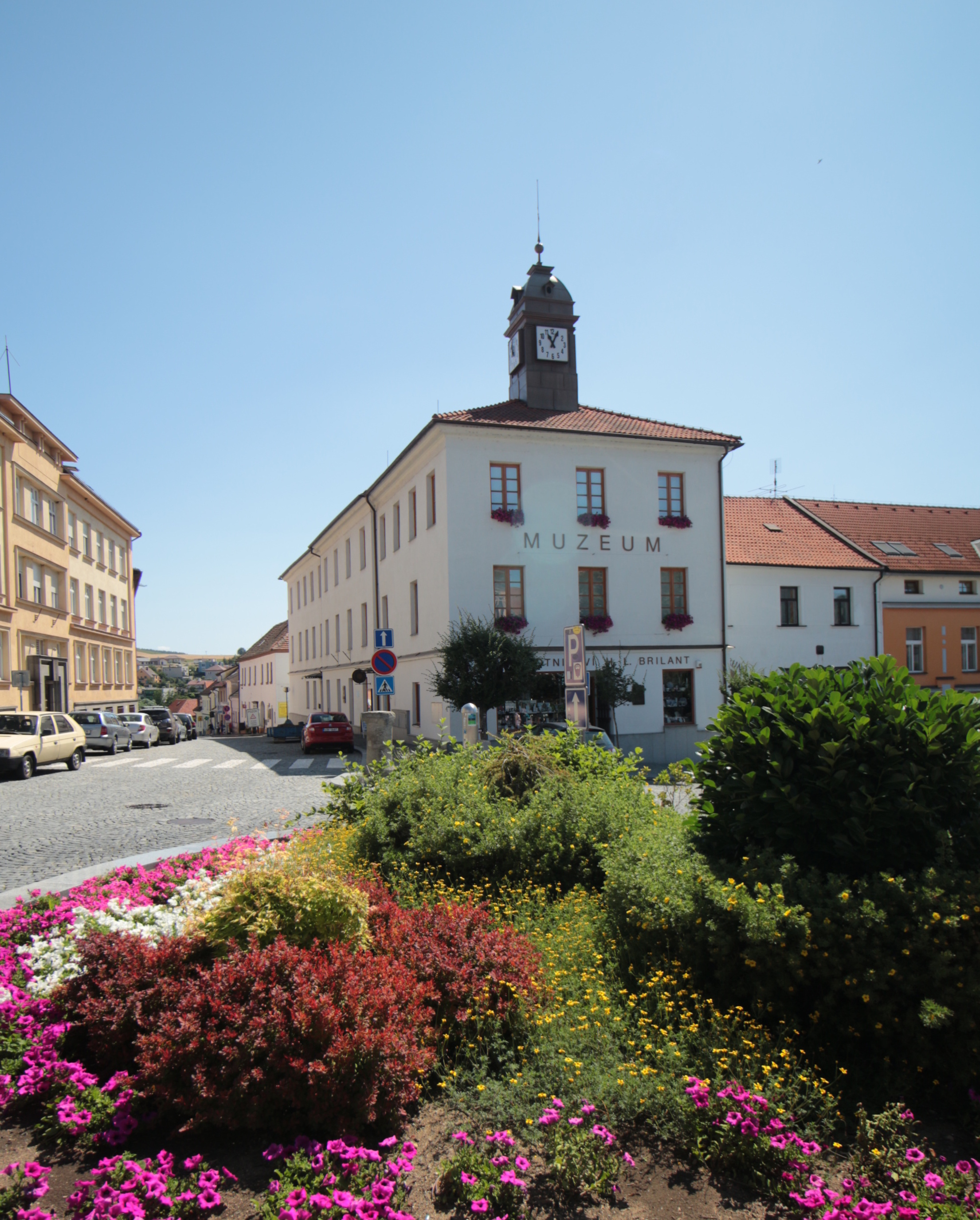 Stará radnice, sídlo Městského muzea Sedlčany